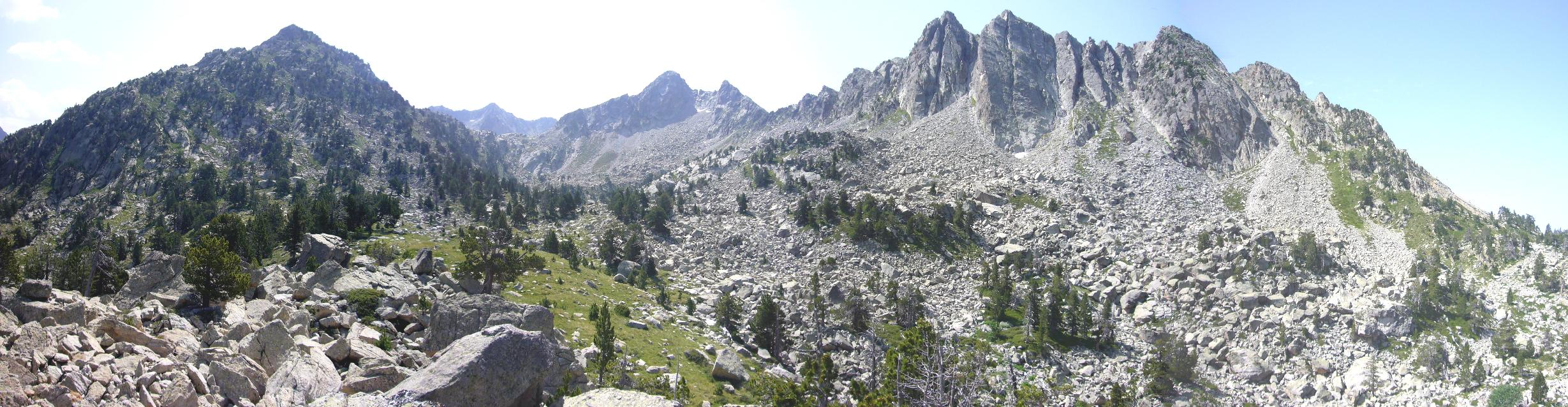 Vall de les Corticelles; la Vall de Boí, Alta Ribagorça, Catalunya